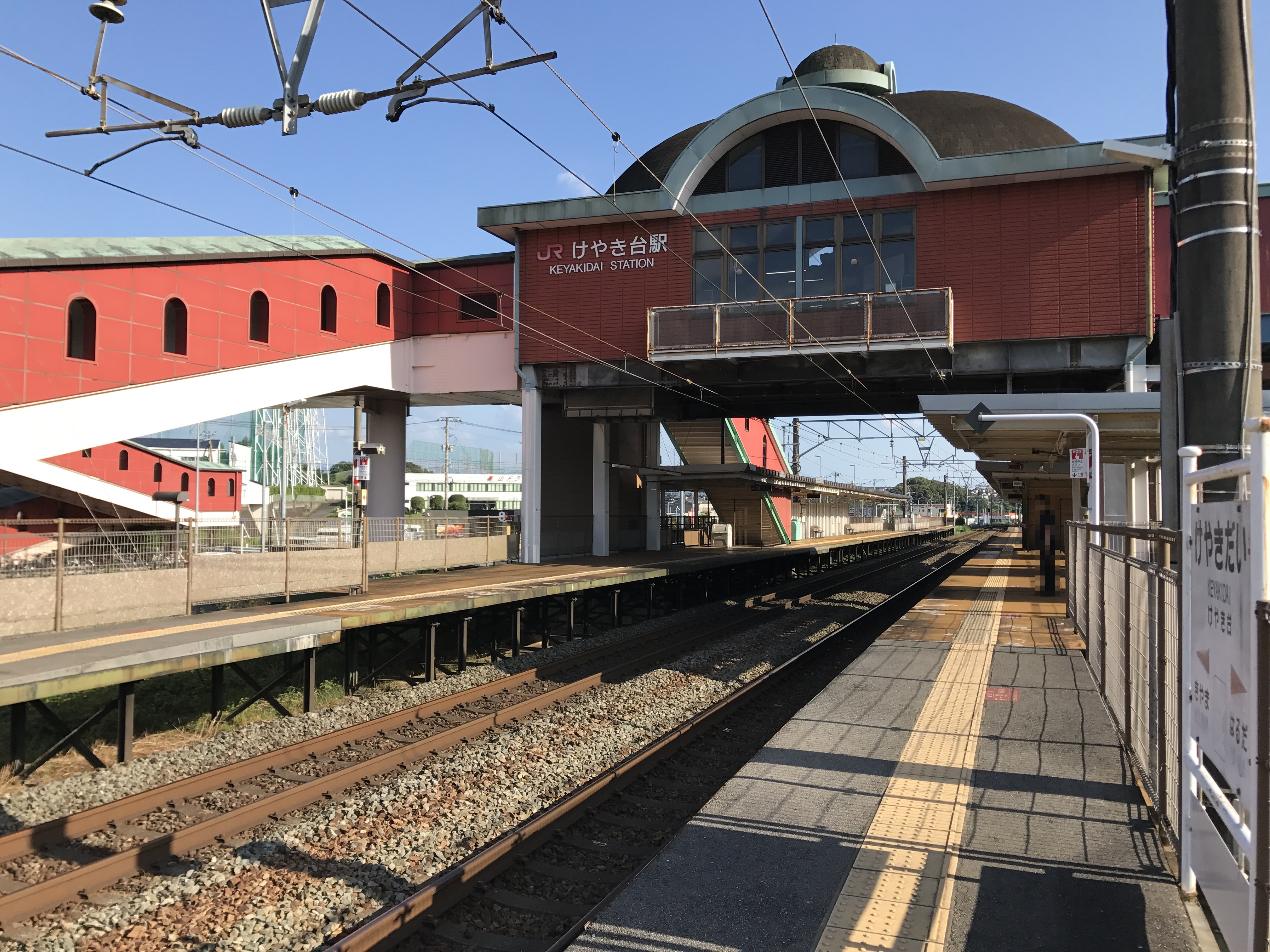 けやき台駅のホームと駅舎(奥は基山方面)